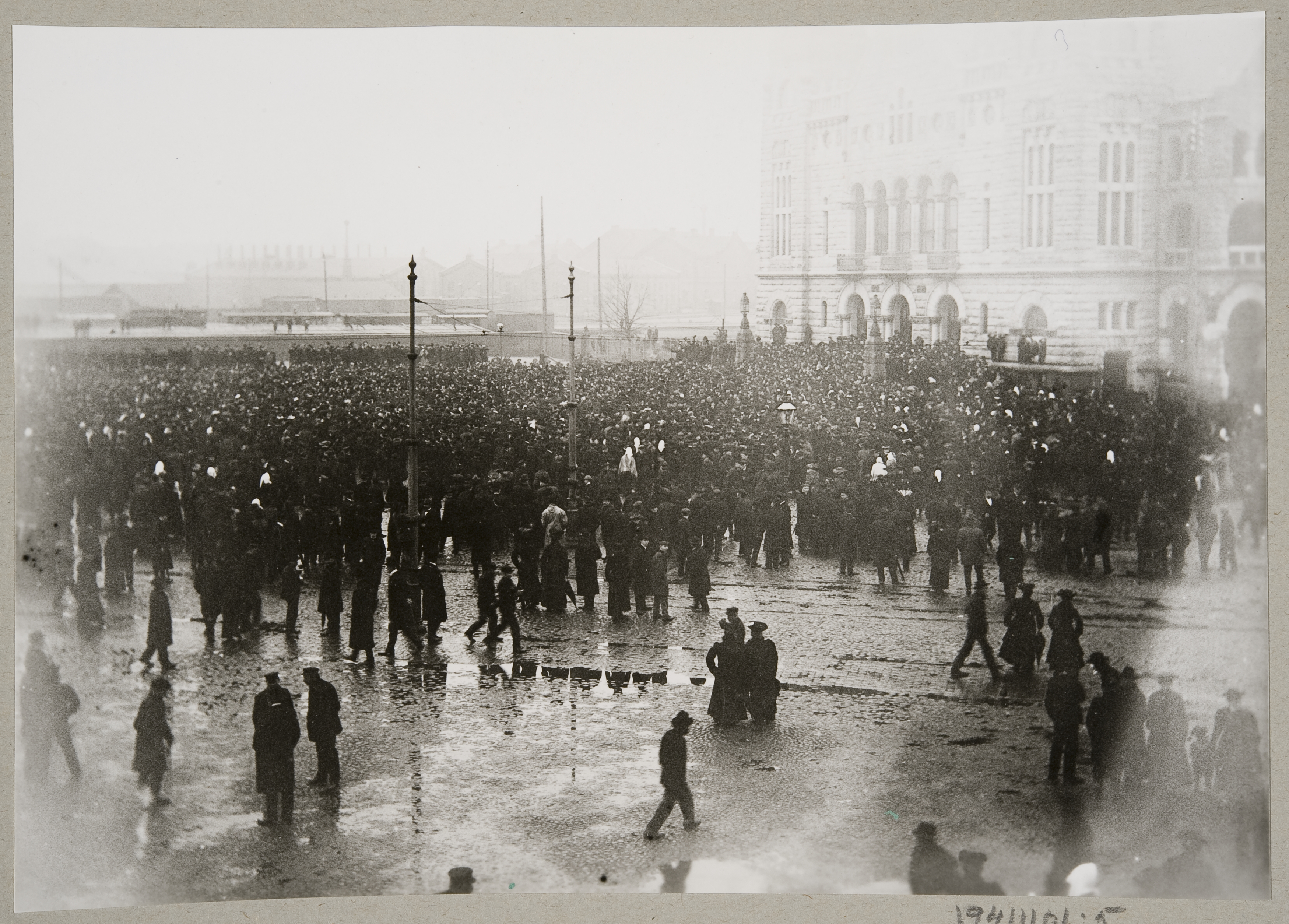 Suurlakon toinen päivä Helsingin rautatientorilla 30.10.1905